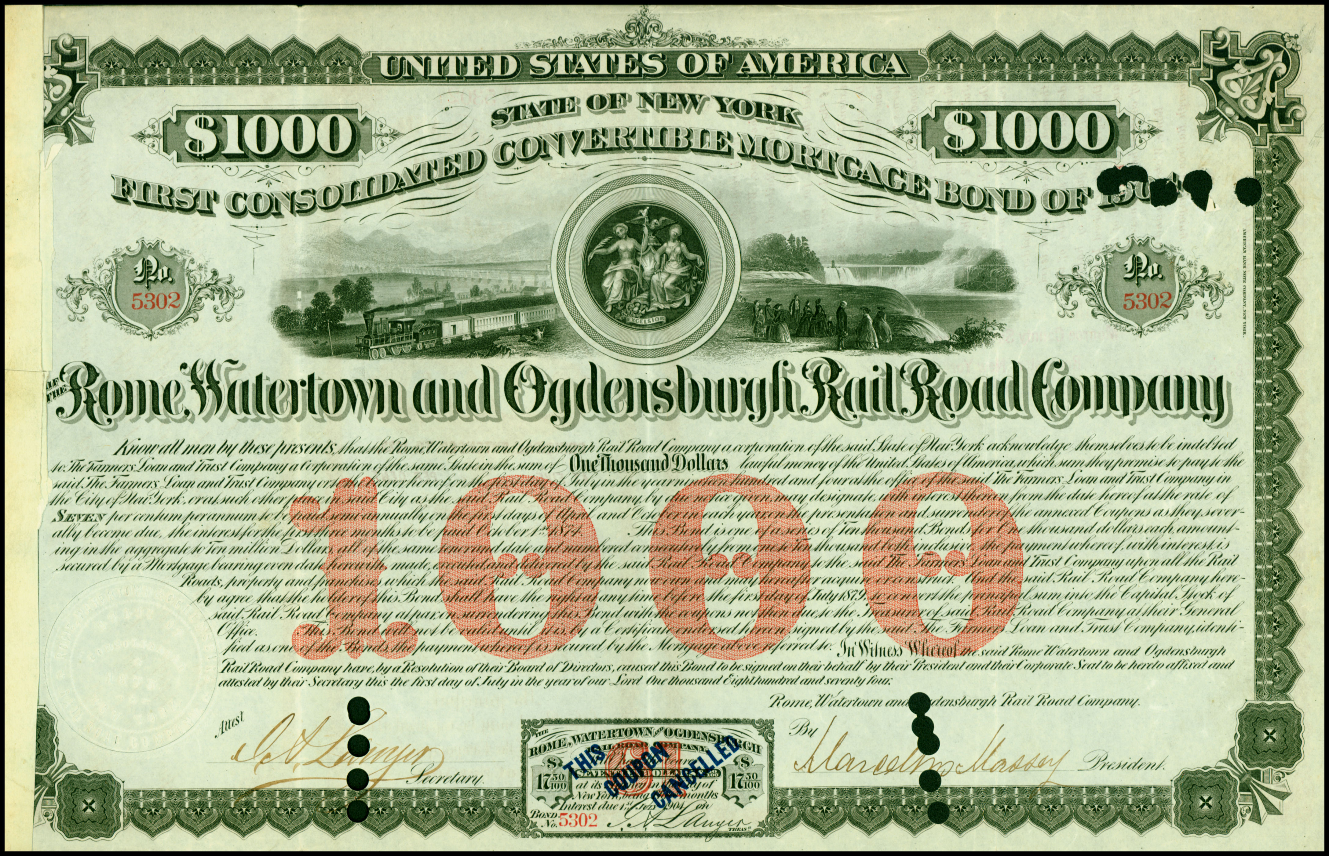 Anleihe der Rome, Watertown and Ogdensburgh Rail Road Company vom 1. Juli 1874